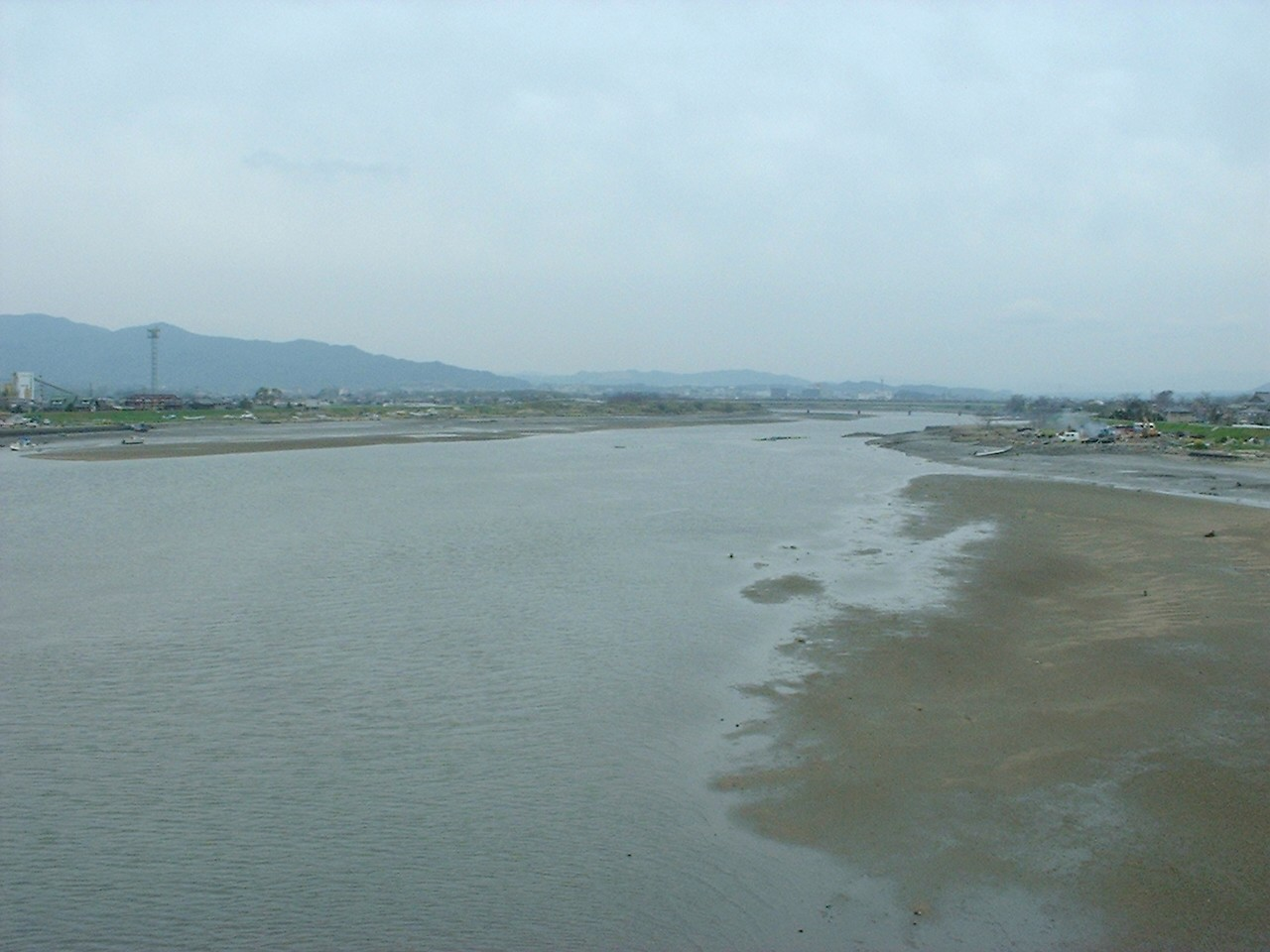 下流部の菊池川 新大浜橋（玉名市）から上流方を望む 2005年4月 Bakkai撮影